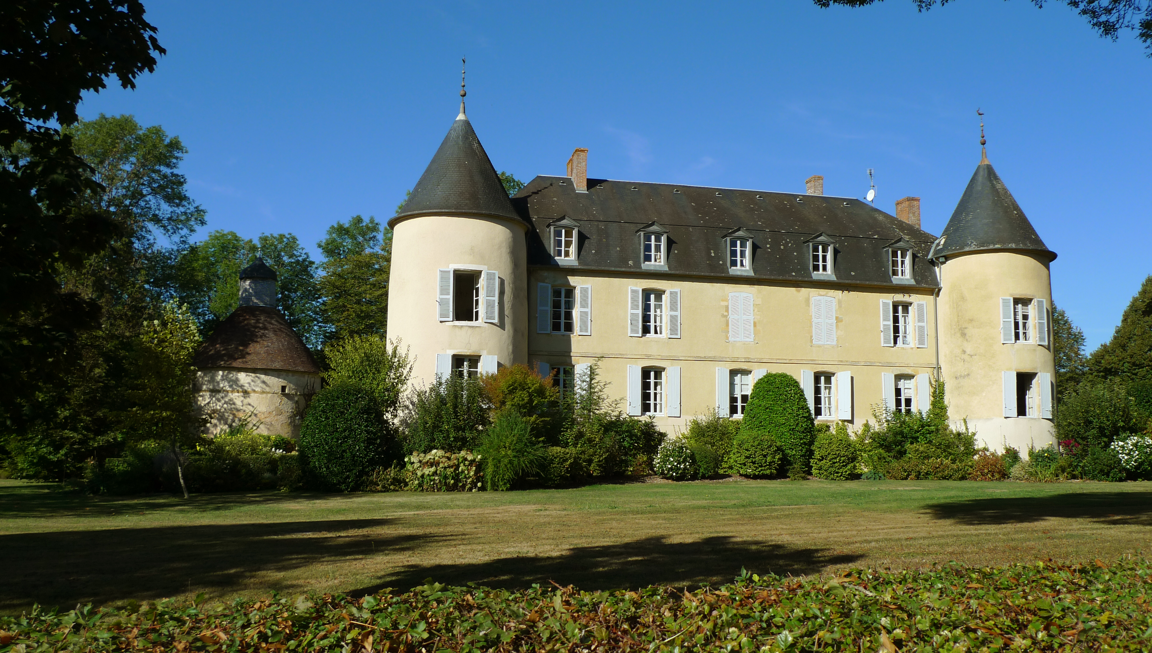 Château de Lichy, à Bona (Nièvre, France) .